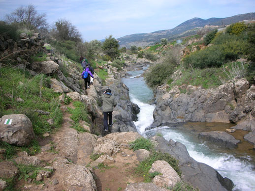 נחל סער כפי שצילמתי אותו היום